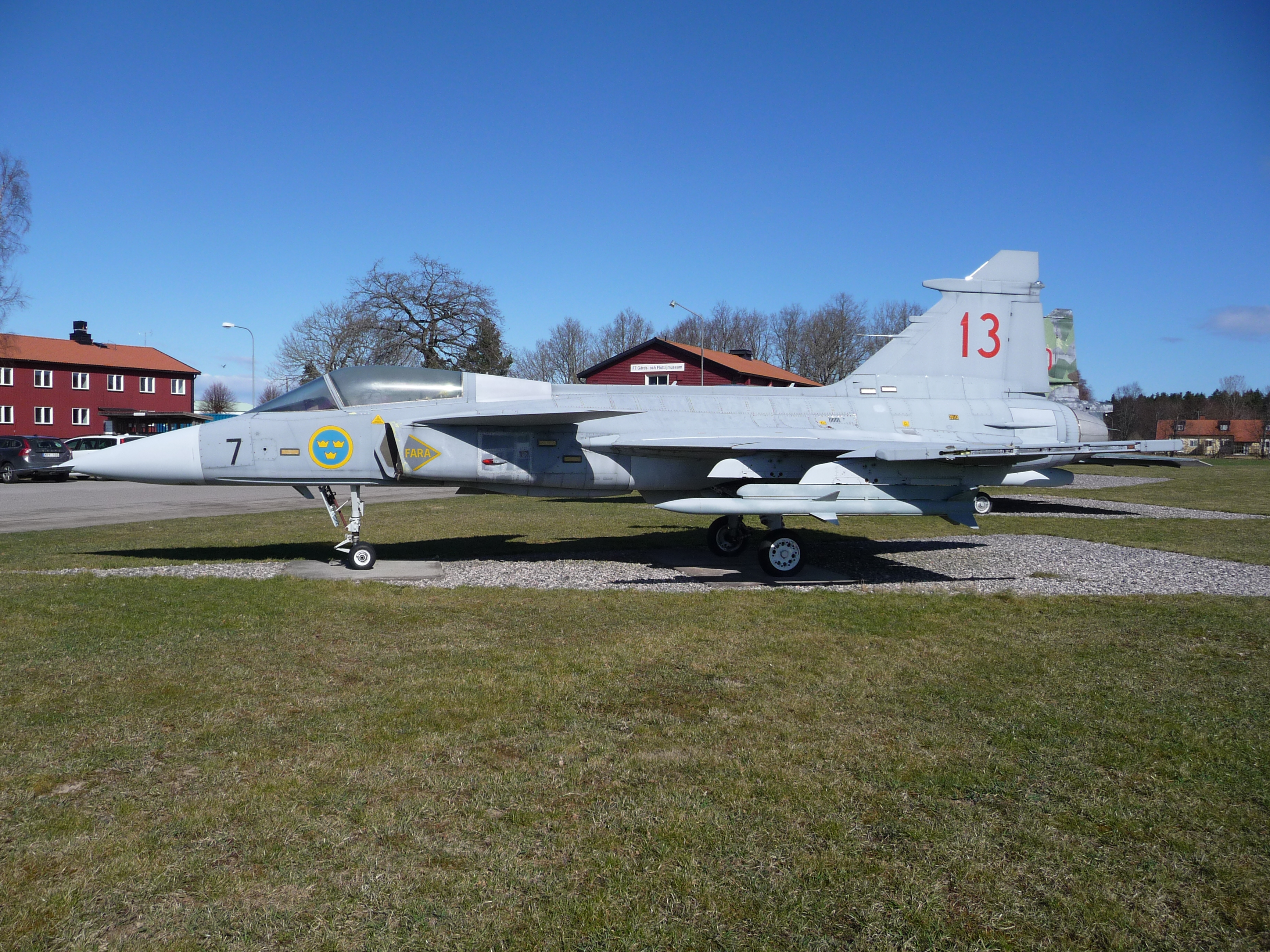 JAS 39A Gripen vid Skaraborgs flygflottilj (F 7).